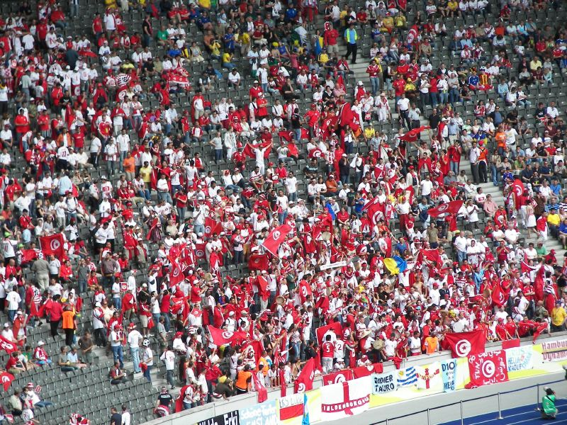 Berlin, Olympiastadion: Ukraine gegen Tuniesien